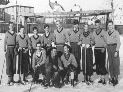 HIL BANDYGRUPPA, HAMAR STADION, EPLENIKKERS, SKØYTER. 1. rekke v: Odd Normann, Harald "Vors" Halvorsen, Magnus Oppheim, 2. r. v: Lorang Magnussen, Hans Hval, Hans Skaug, Arne Østby, Alf Bakke, Alf Ingvaldsen, Erling Berntsen, Torstein Øde, Tor Madson.